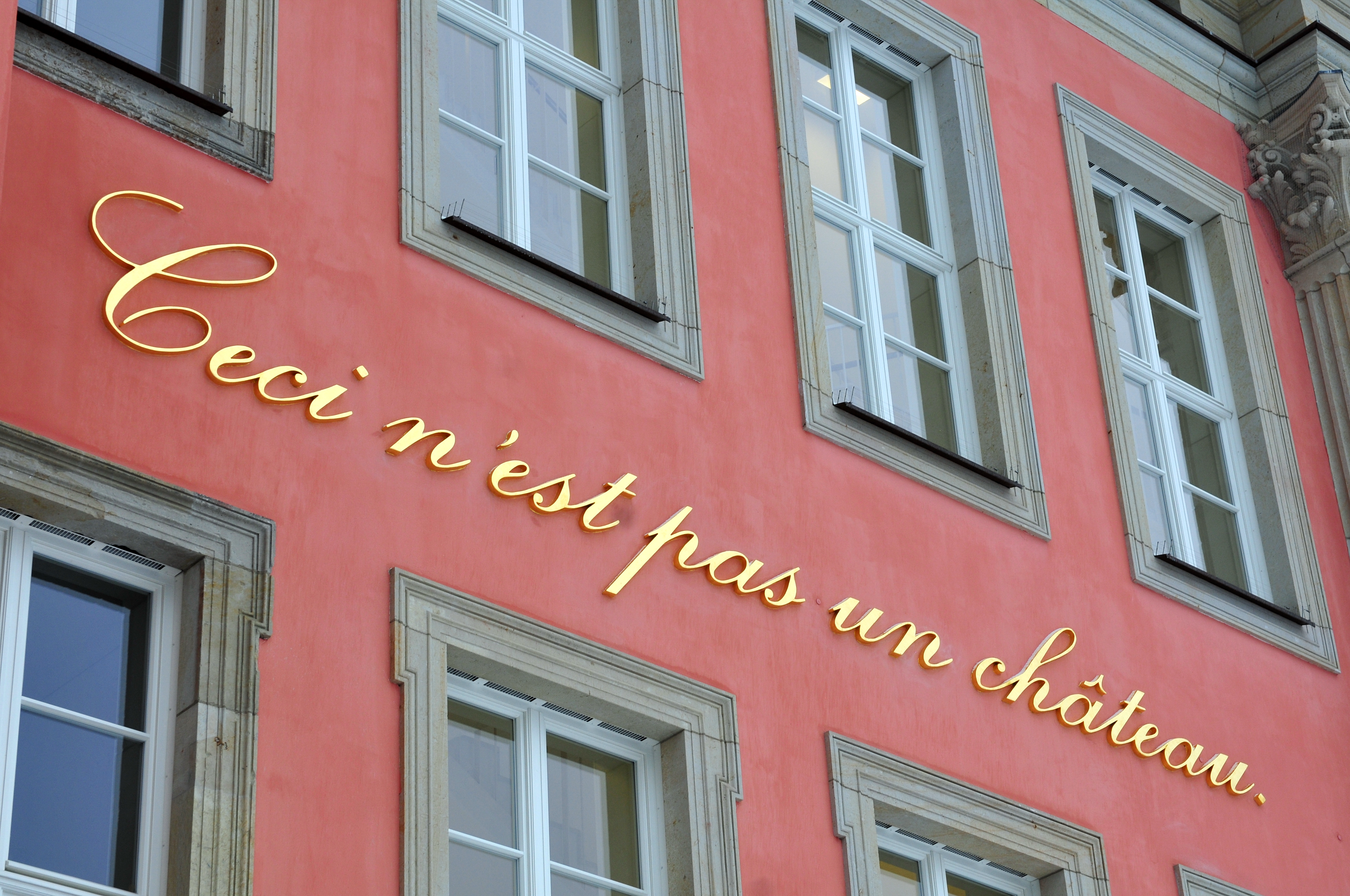 Landtag Brandenburg in Potsdam